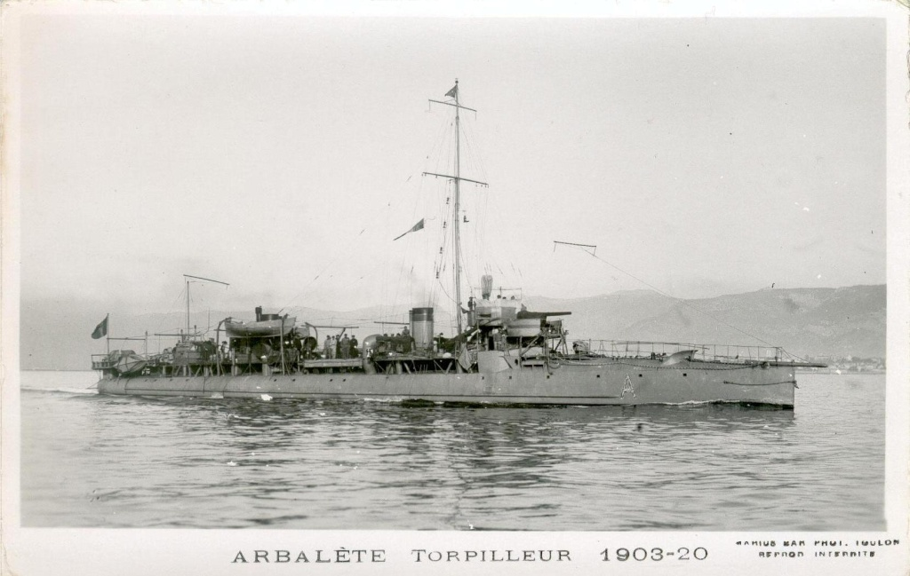 Contre-torpilleur français : Arbalete